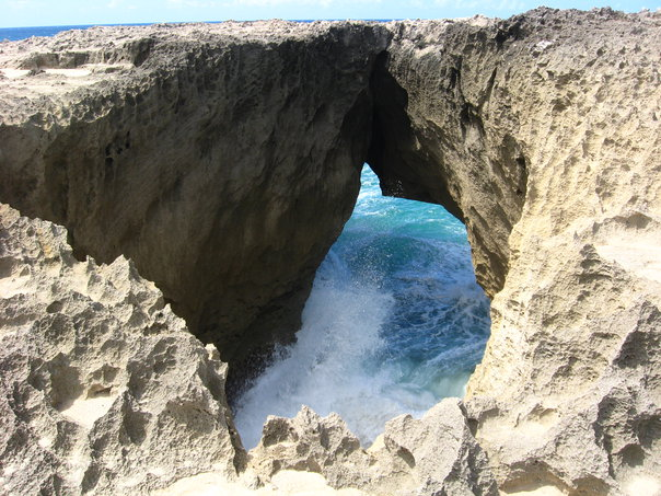 Pozo de Jacinto